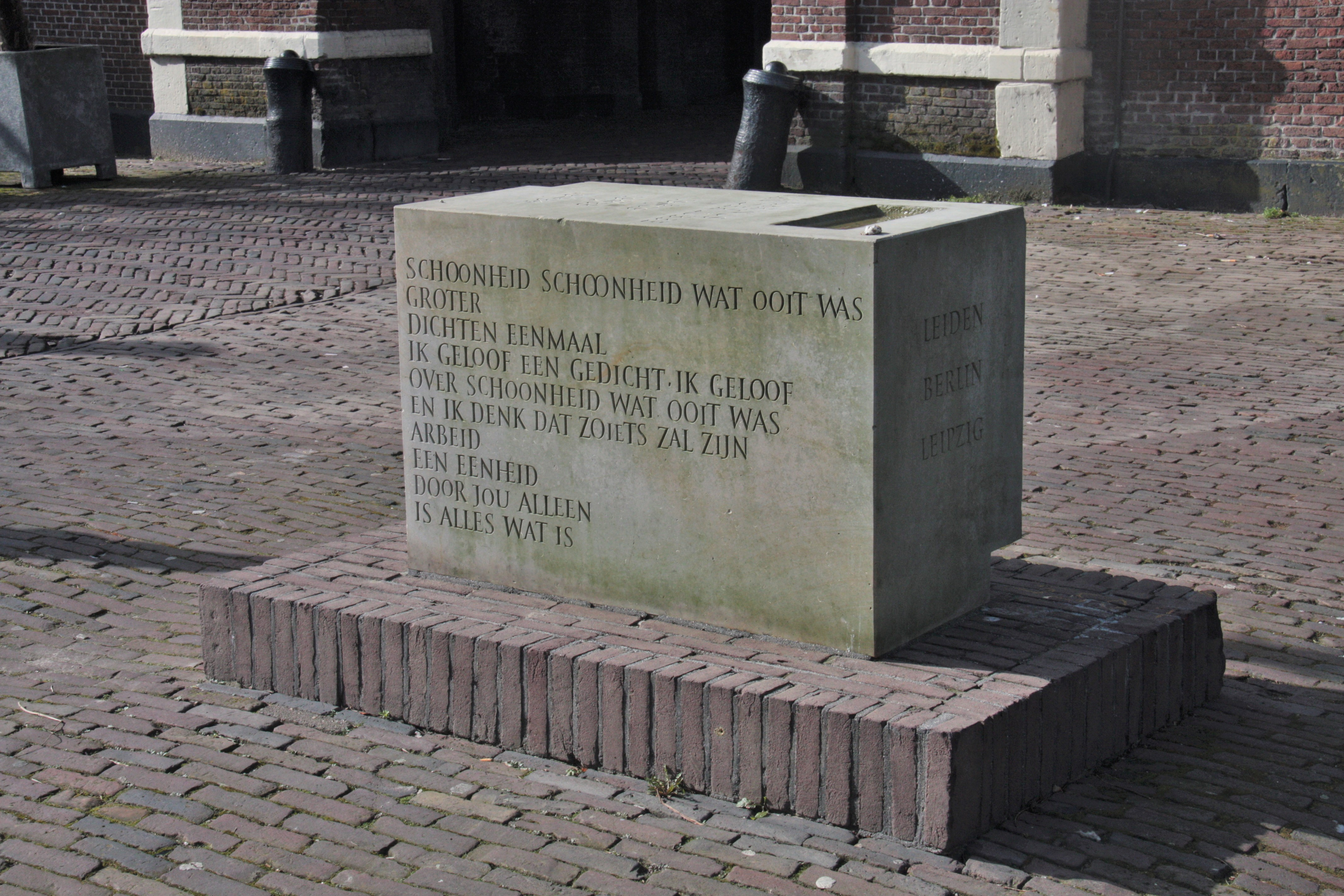 Меморіал Марінусу ван дер Люббе біля брами Морспорт, Лейден, Нідерланди